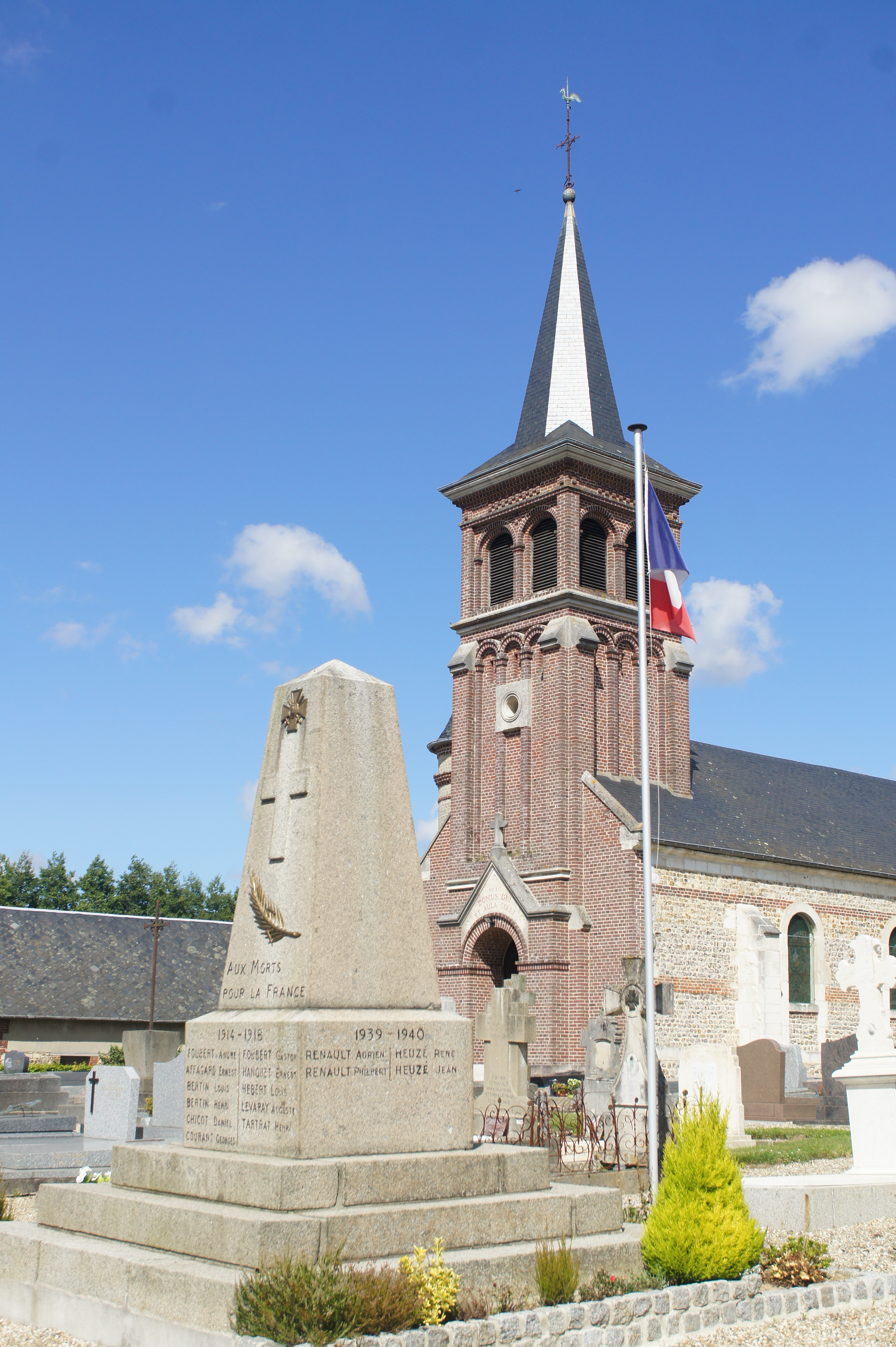 Église de Grainville-Ymauville